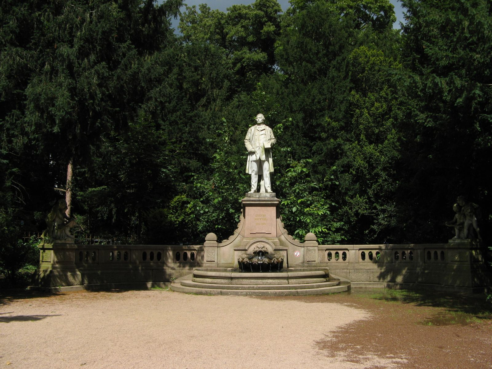 Brunnendenkmal für Gustav Freytag im Kurpark Wiesbaden, Hessen